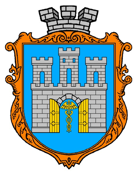 Герб Рави-Руської